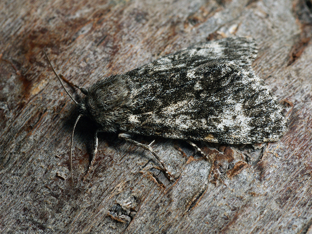 Exemplar found: Russia, Moscow Oblast, Odintsovsky District, near village Pestovo, 01.07.2017, by light МО, Одинцовский р-н, окрестности деревни Пестово, 01.07.2017, на свет